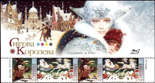 Художні поштові марки серії «Казковий світ» «Снігова Королева», надруковані зчіпкою з двох марок: № 1121 і № 1122. Формат марки № 1121 – 26,1х26,1 мм. Формат марки № 1122 – 43,5х26,1 мм. Номінал марки № 1121 – 6,00 грн. Номінал марки № 1122 – 1,50 грн. На кожній марці текст: «Вид. «А-БА-БА-ГА-ЛА-МА-ГА». Перфорація гребінчаста – 11 1/2. Кількість зчіпок в аркуші – 10. Тираж зчіпки – 192 000 примірників. Захист марок: мікротекст "В. Єрко." В УФ променях світяться світлі елементи на марках. Художник марок та штемпеля – Владислав Єрко. Марки – багатоколірні; спосіб друку – офсет. Марки надруковано на ДП "Поліграфічний комбінат "Україна" по виготовленню цінних паперів". Поля маркового аркуша художньо оформлені. На полях маркового аркуша штриховий код – 4823027131337; Зам. 1-3313. 06.07.2011.